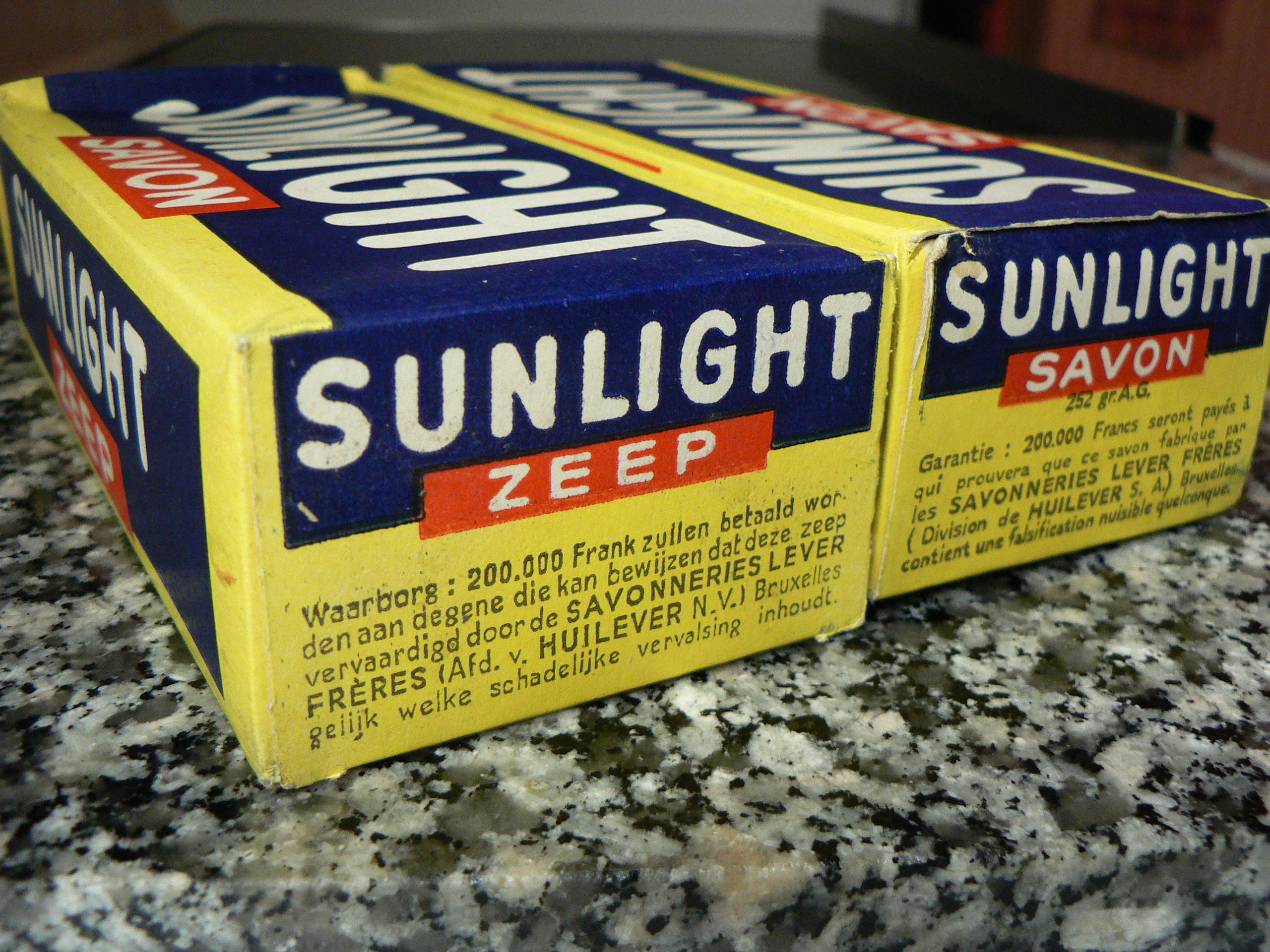 keldervondst: Oude Sunlight (zeep) geproduceerd bij de Lever Brothers